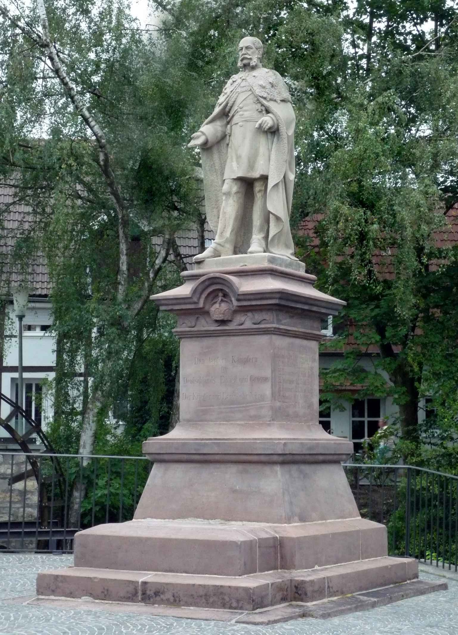 Kaiser-Wilhelm-I.-Denkmal (als Kriegerdenkmal für die Gefallenen der Kriege von 1864, 1866 und 1870/1871) in Rheda-Wiedenbrück, Nordrhein-Westfalen